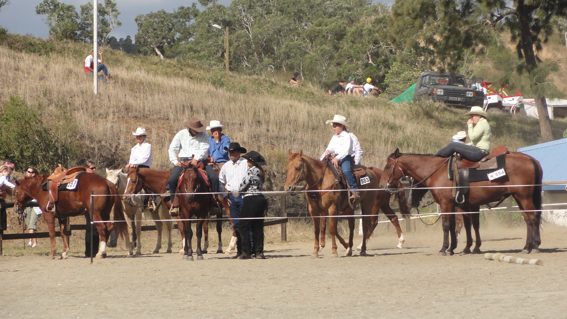 Jeux équestres de la Foire de Bourail